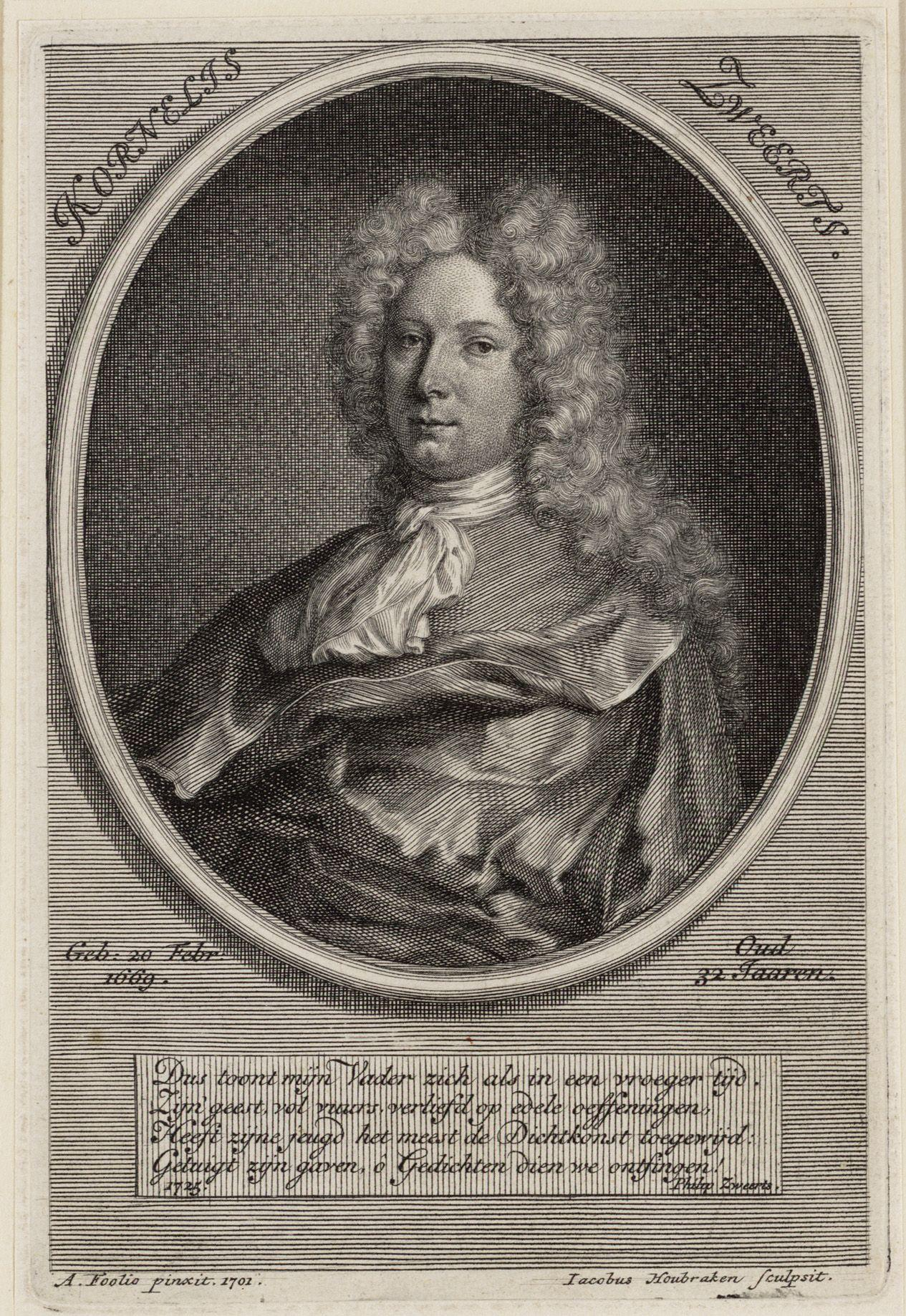 Cornelis Sweerts (Kornelis Zweerts) op 32-jarige leeftijd. Het onderschrift luidt: "Dus toont mijn Vader zich als in een vroeger tijd. Zijn geest, vol vuurs, verliefd op edele oeffeningen, Heeft zijne jeugd het meest de Dichtkonst toegewijd: Getuigt zijn gaven, ô Gedichten dien we ontfingen!" Philip Zweerts.